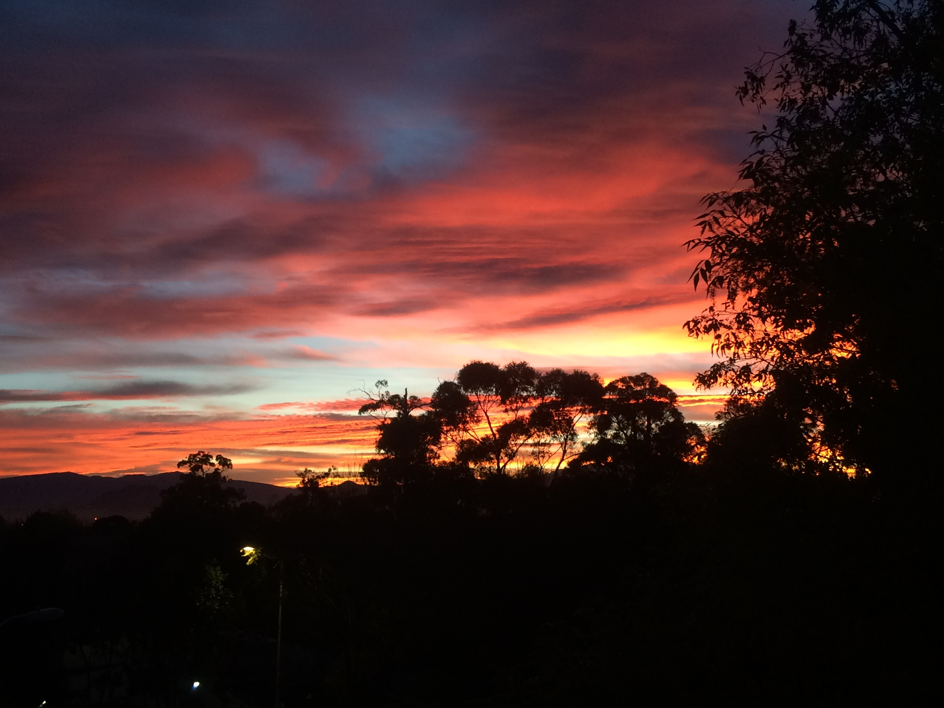 Es la vista que tenemos en la delegación tlalpan